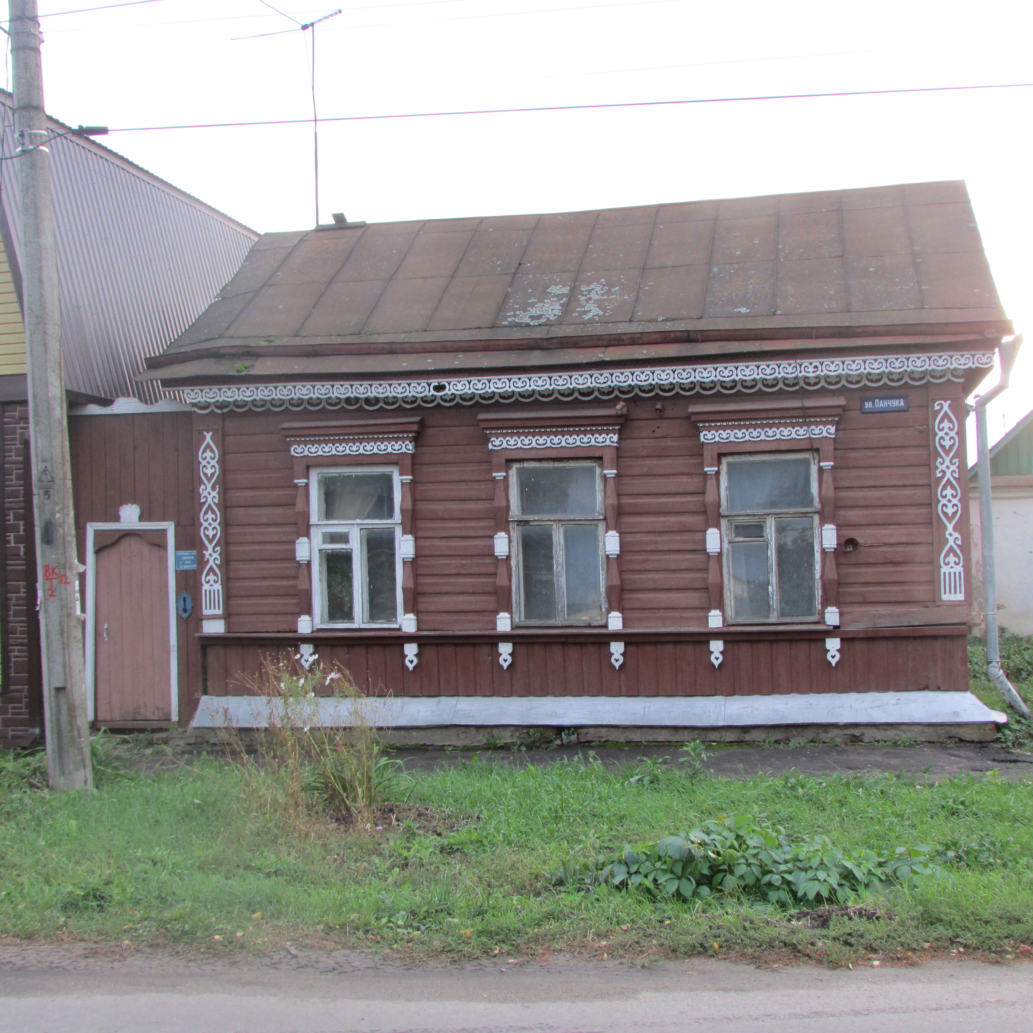 Дом, в котором жил востоковед Н.И. Конрад: улица Панчука, 55, Орёл, Орловская область